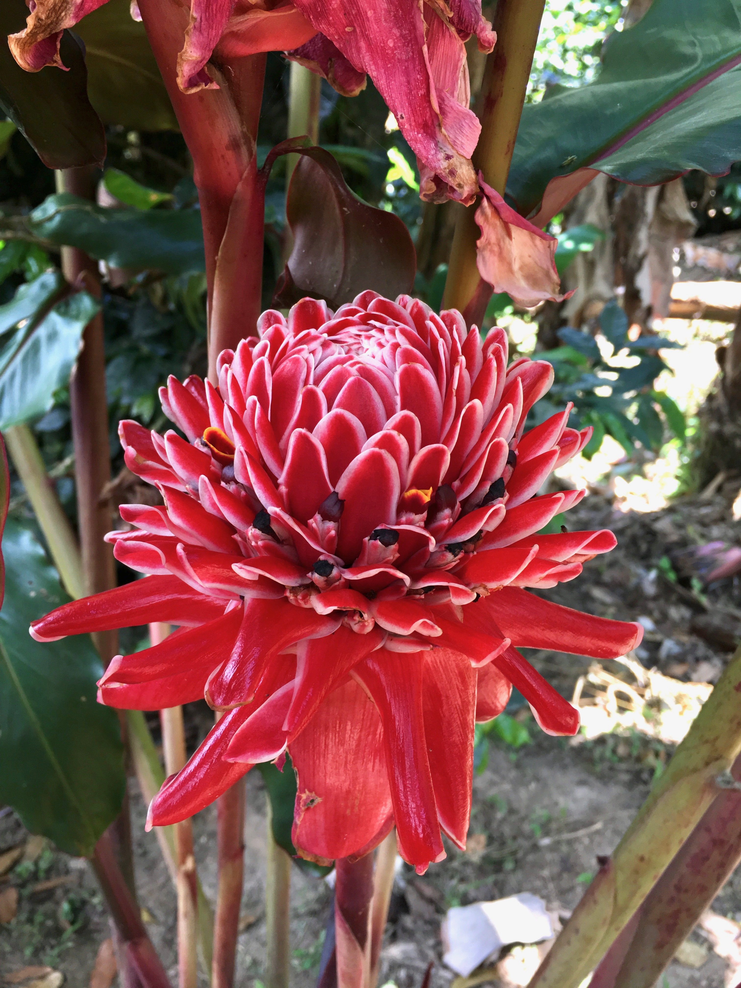 Il s'agit d'une photo de rose de porcelaine.